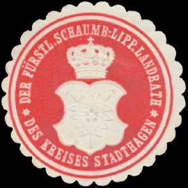 Sealing stamp Title: Der F. Schaumb. Lipp. Landrath des Kreises Stadthagen Description: rot, weiß, geprägt Place: Stadthagen size: 4 cm